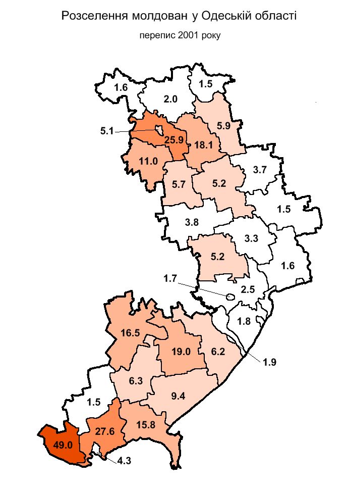 Розселення молдован в Одеській області за переписом 2001 р. / Moldovans in Odesa oblast, 2001 census